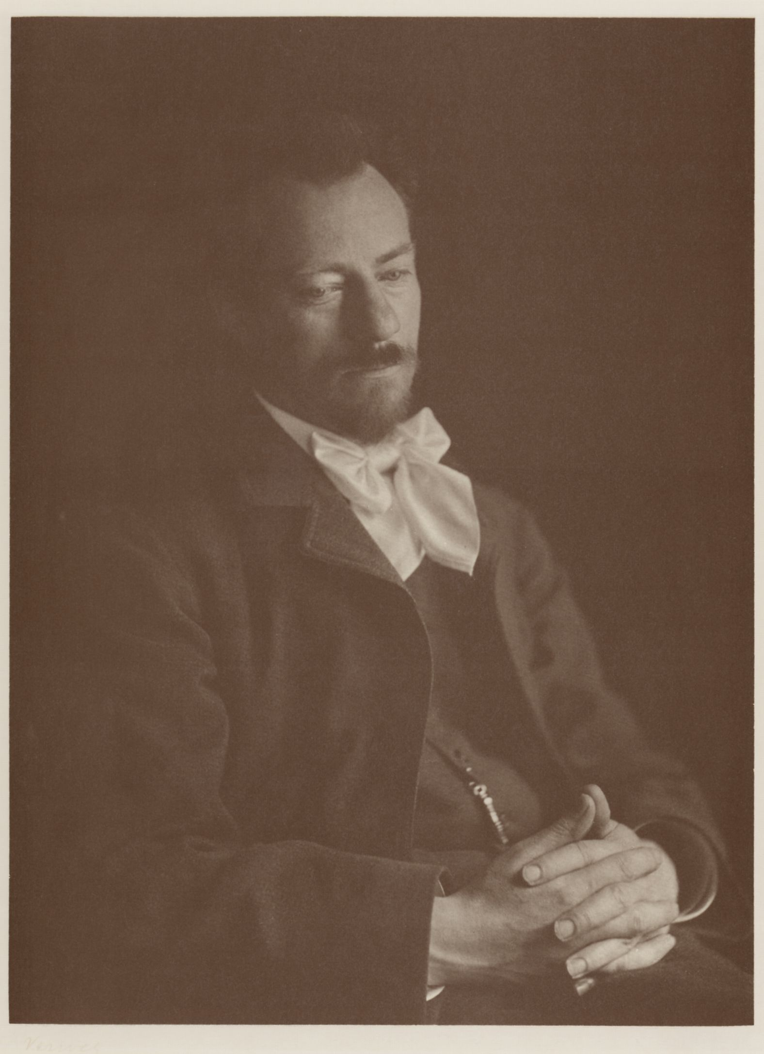 Portrait of Albert Verwey